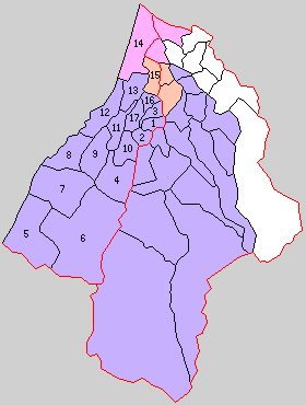 山形県西田川郡の位置。